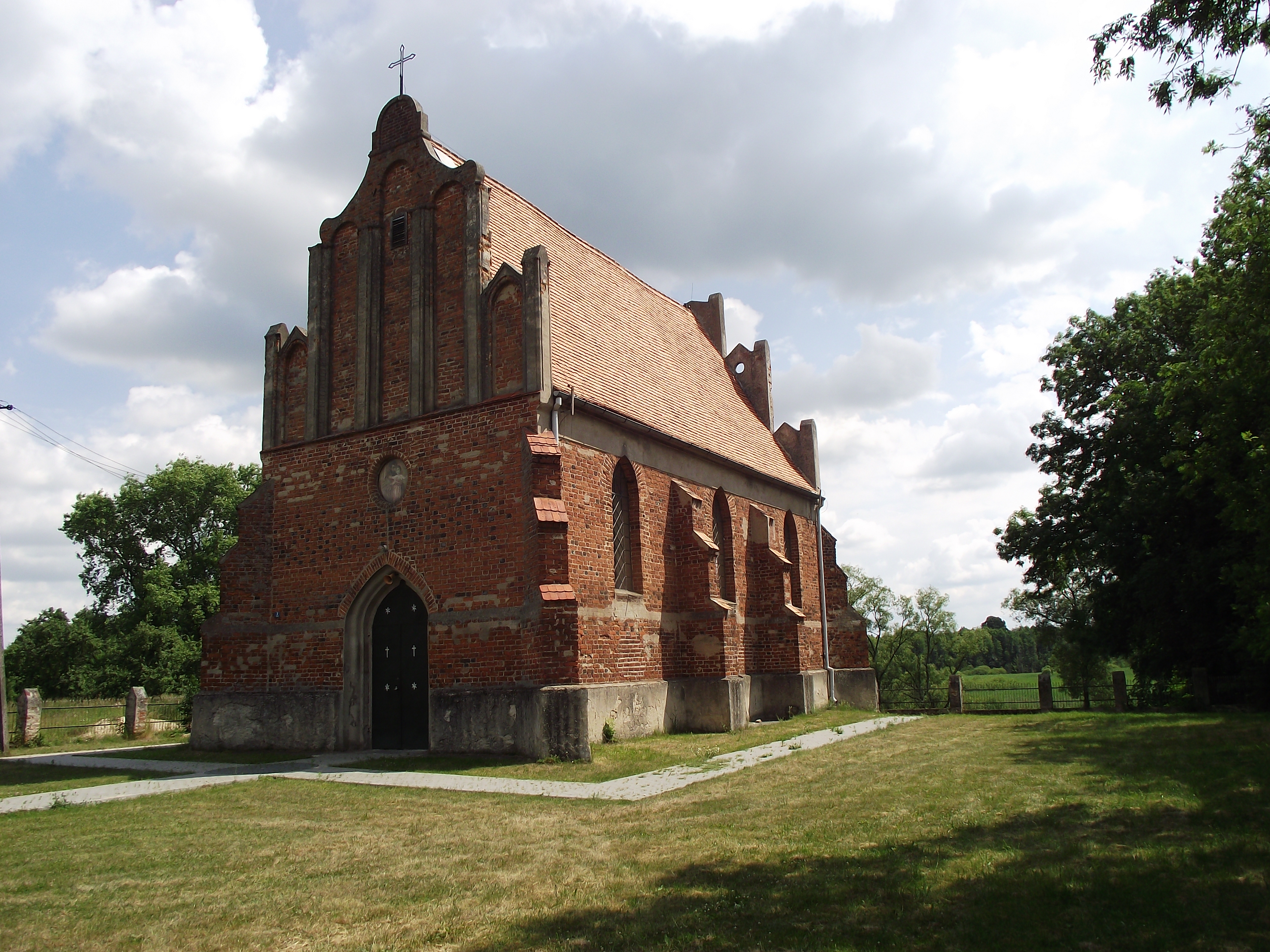 Kościół w Warzymowie, XV w. - Kościół filialny parafii w Skulsku